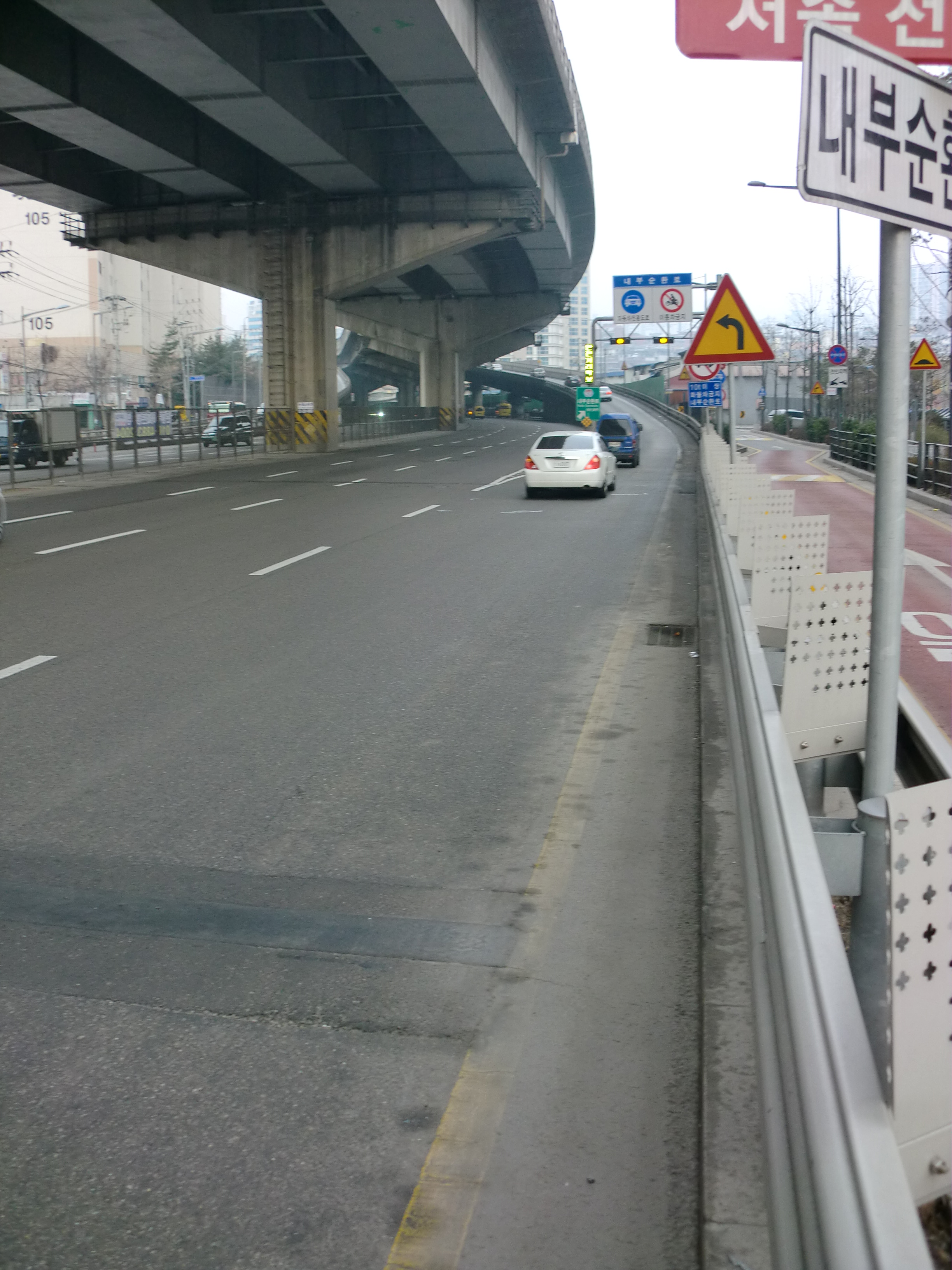 내부순환로 길음나들목